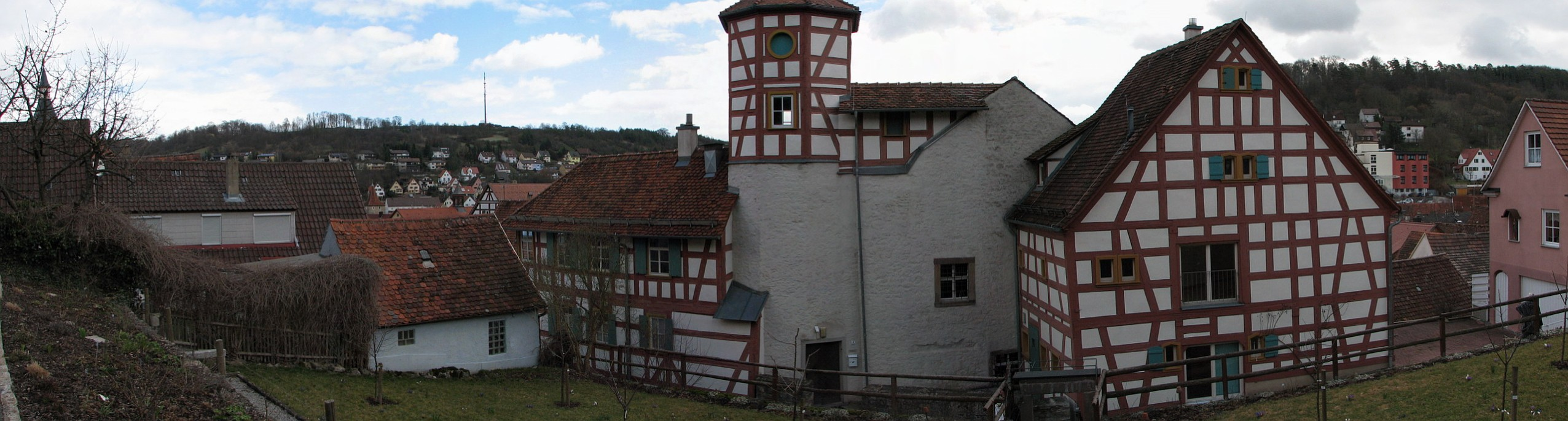 Photo personnelle - avril 2006